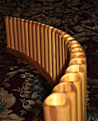 Vue de profil d'un naï roumain